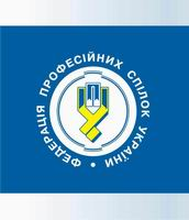 Флаг Федерации профсоюзов Украины (ФПУ)